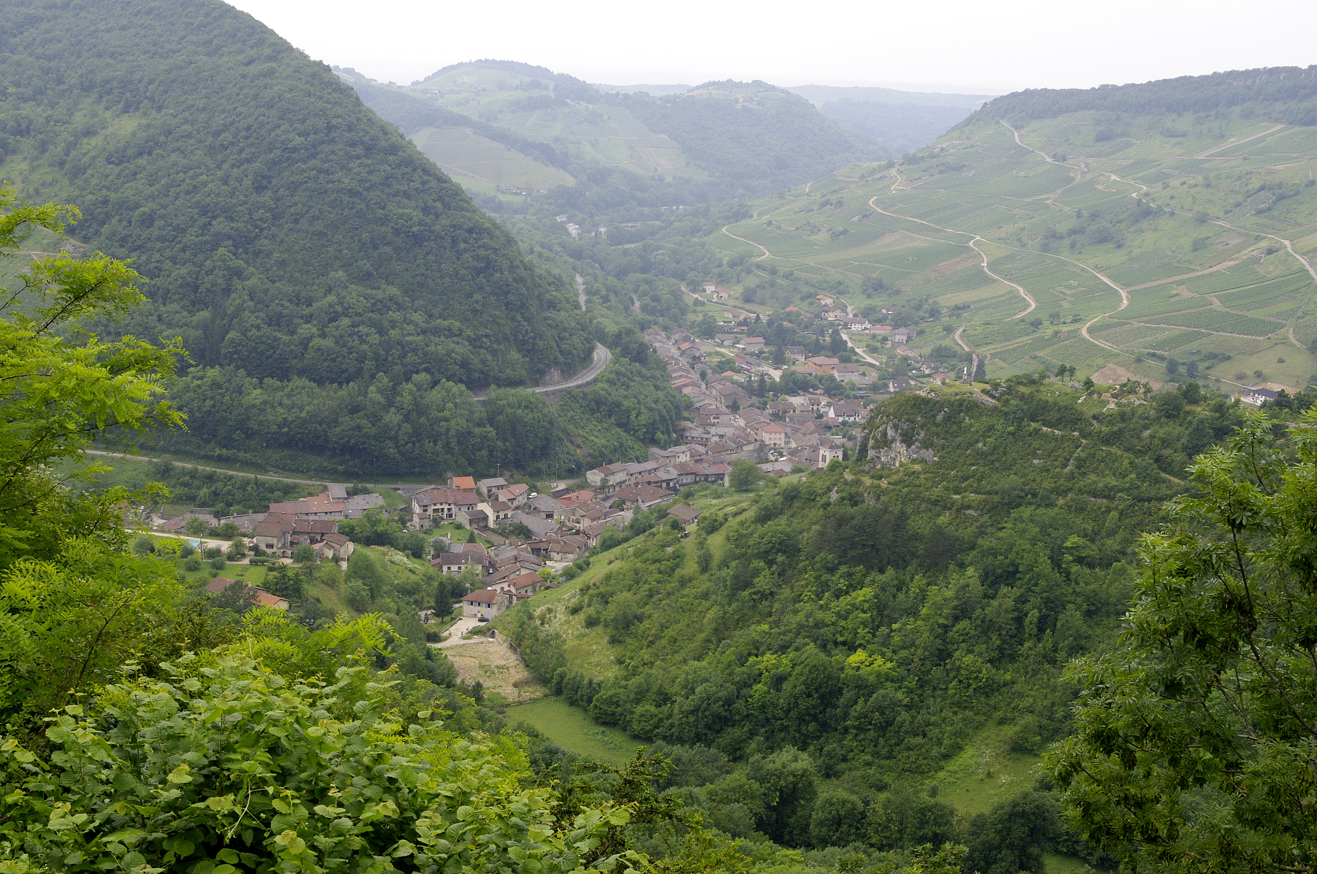 Vallée de Cerdon, Ain, France